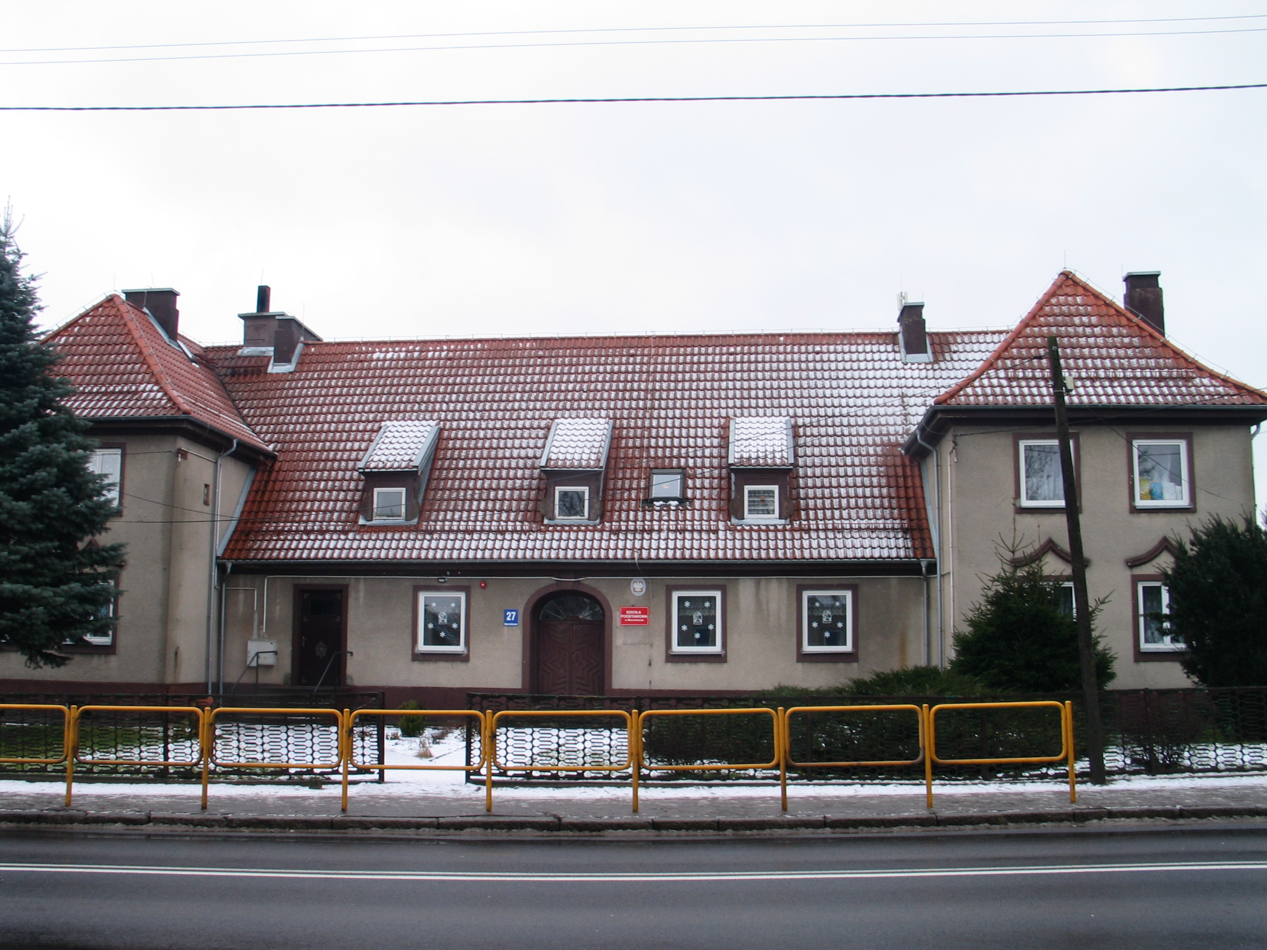 Начальная школа в селе Марцинково (Польша)